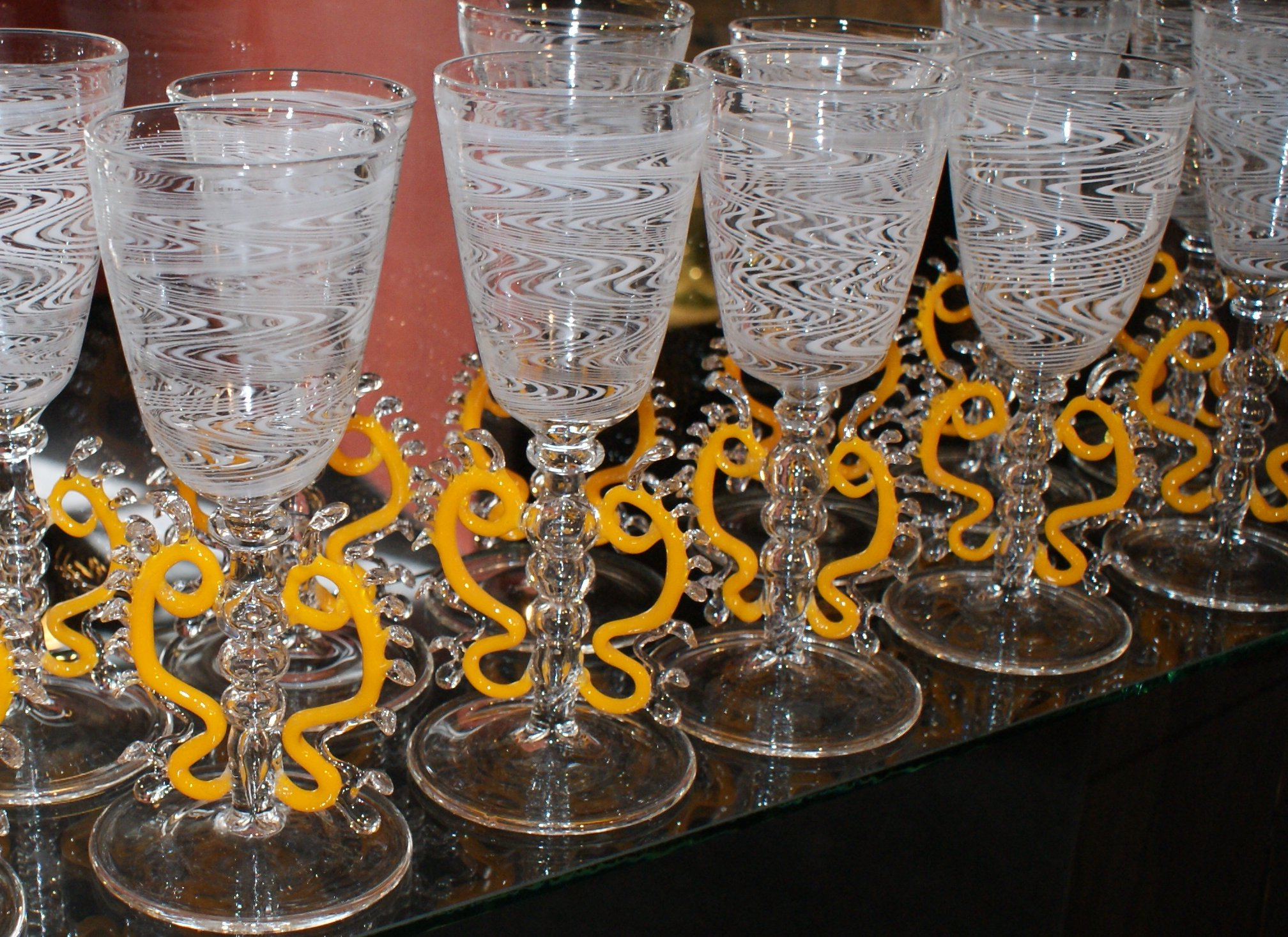 Glasmuseum Wertheim, Deutschland, Main-Tauber-Kreis, Gründung 1976, Objekt: Venezianische Flügelgläser: Nachbildungen von Museumsglasbläser Ralf Marlok